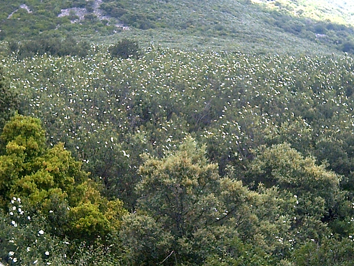 Cistus ladanifer habitat (Jaral), in "Las Lagunillas" Sierra Madrona, Solana del Pino,(Spain).